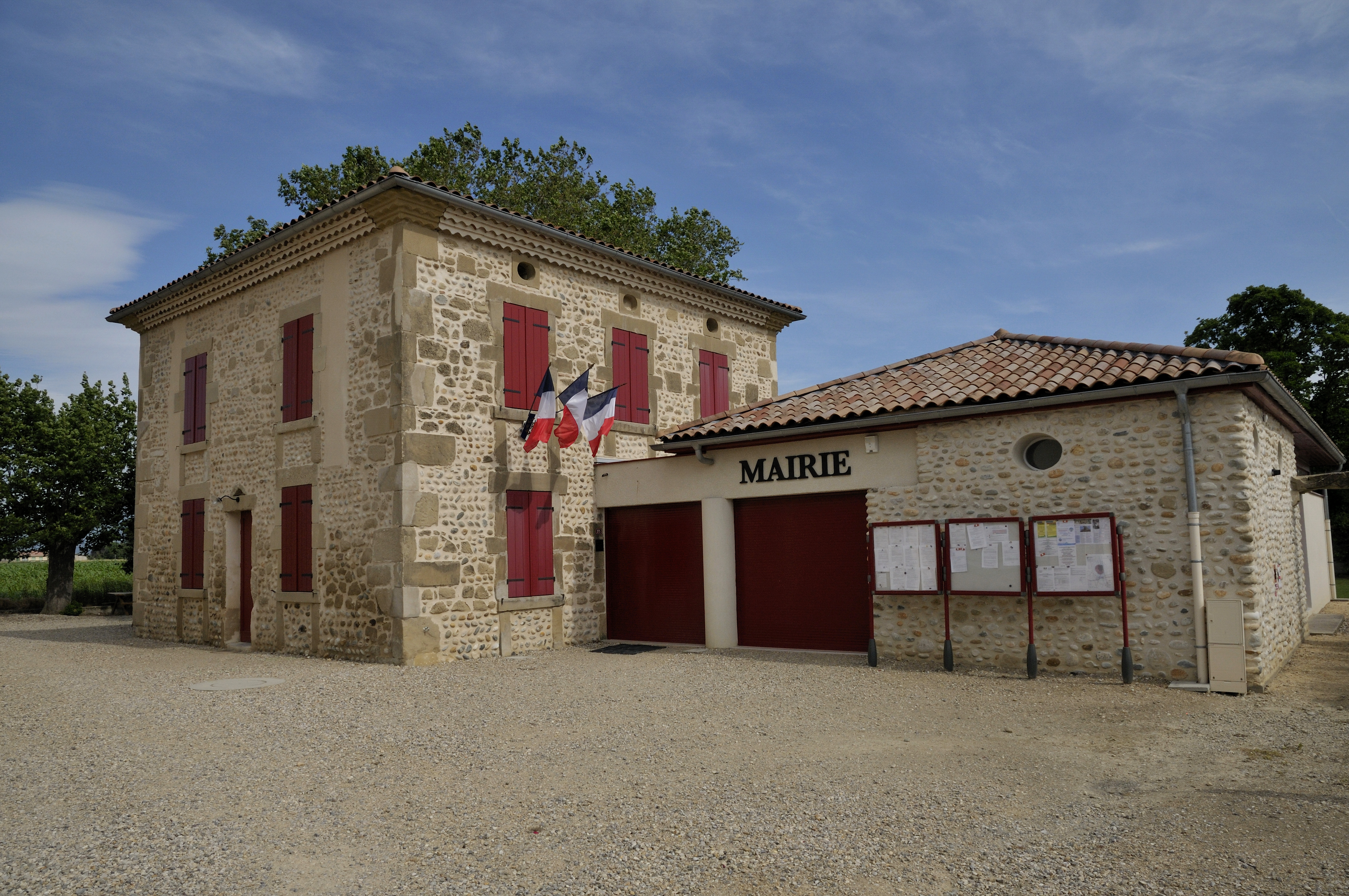 la mairie